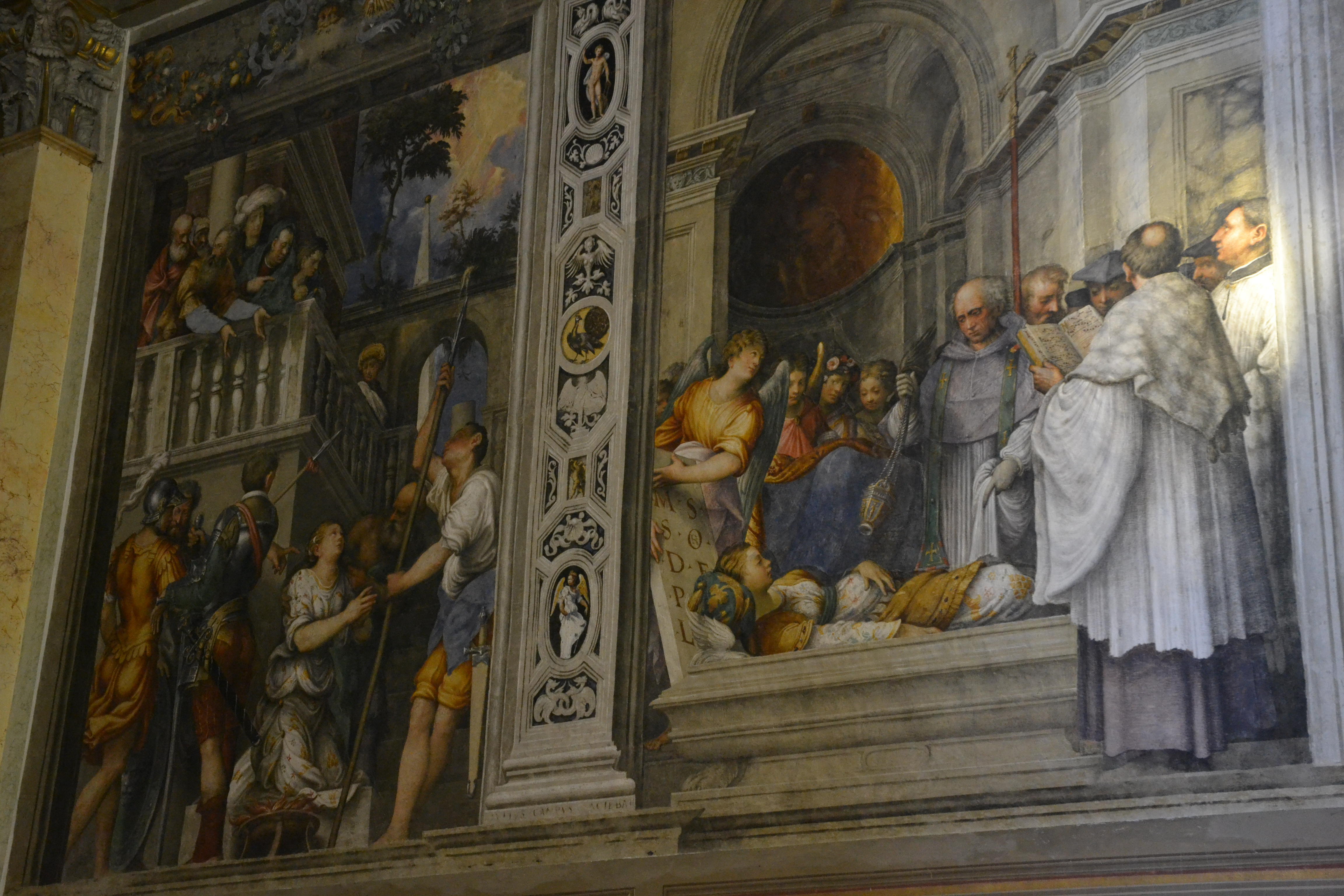 affrescati da Giulio Campi nel 1537 quattro episodi della vita di S. Agata, Chiesa di S. Agata, Cremona